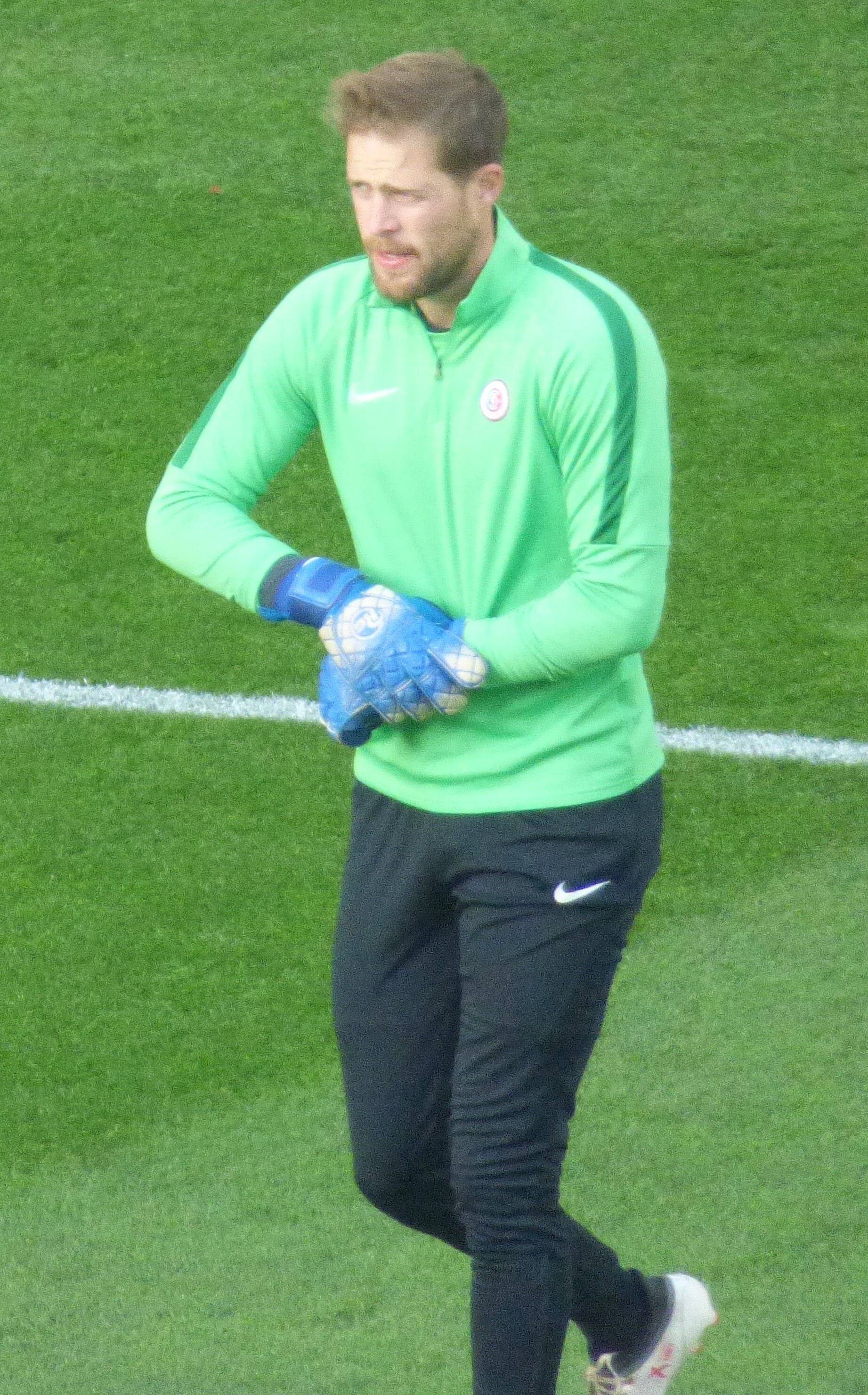 Rémi Pillot avant le match RC Lens / LB Châteauroux, le 3 novembre 2018, comportant pour la treizième journée du championnat de France de football de Ligue 2, au Stade Bollaert-Delelis.